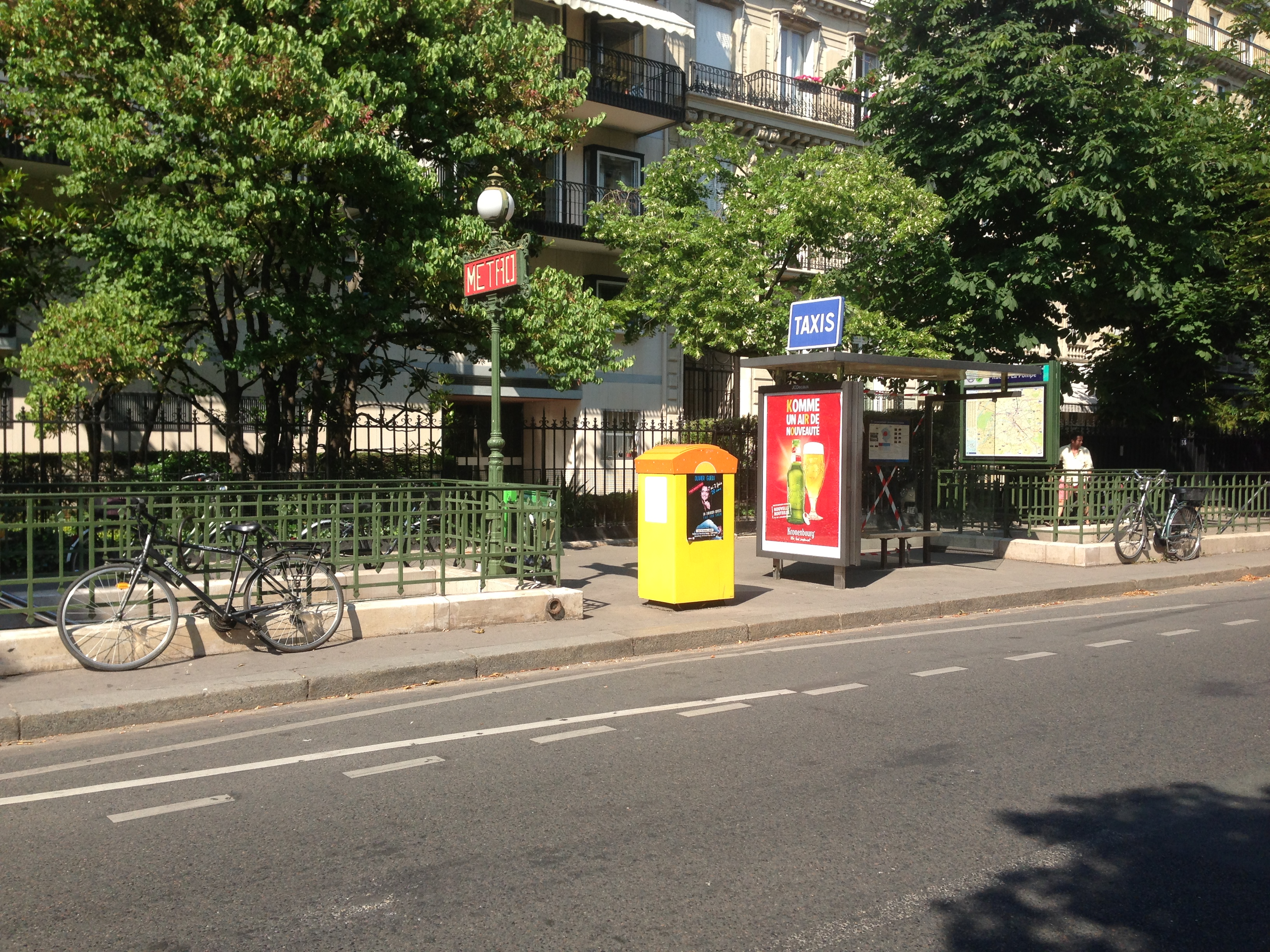 Sortie du métro rue de la Pompe.